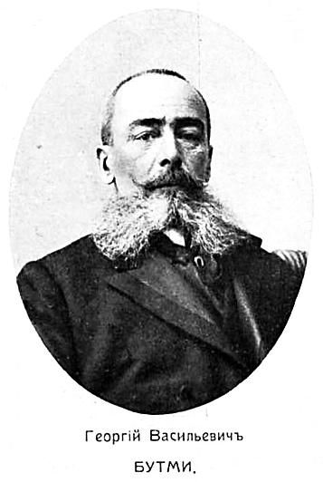 Бутми Георгий Васильевич